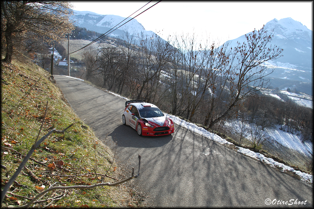 Rajd Monter Carlo 2016 Robert Kubica 3 OS